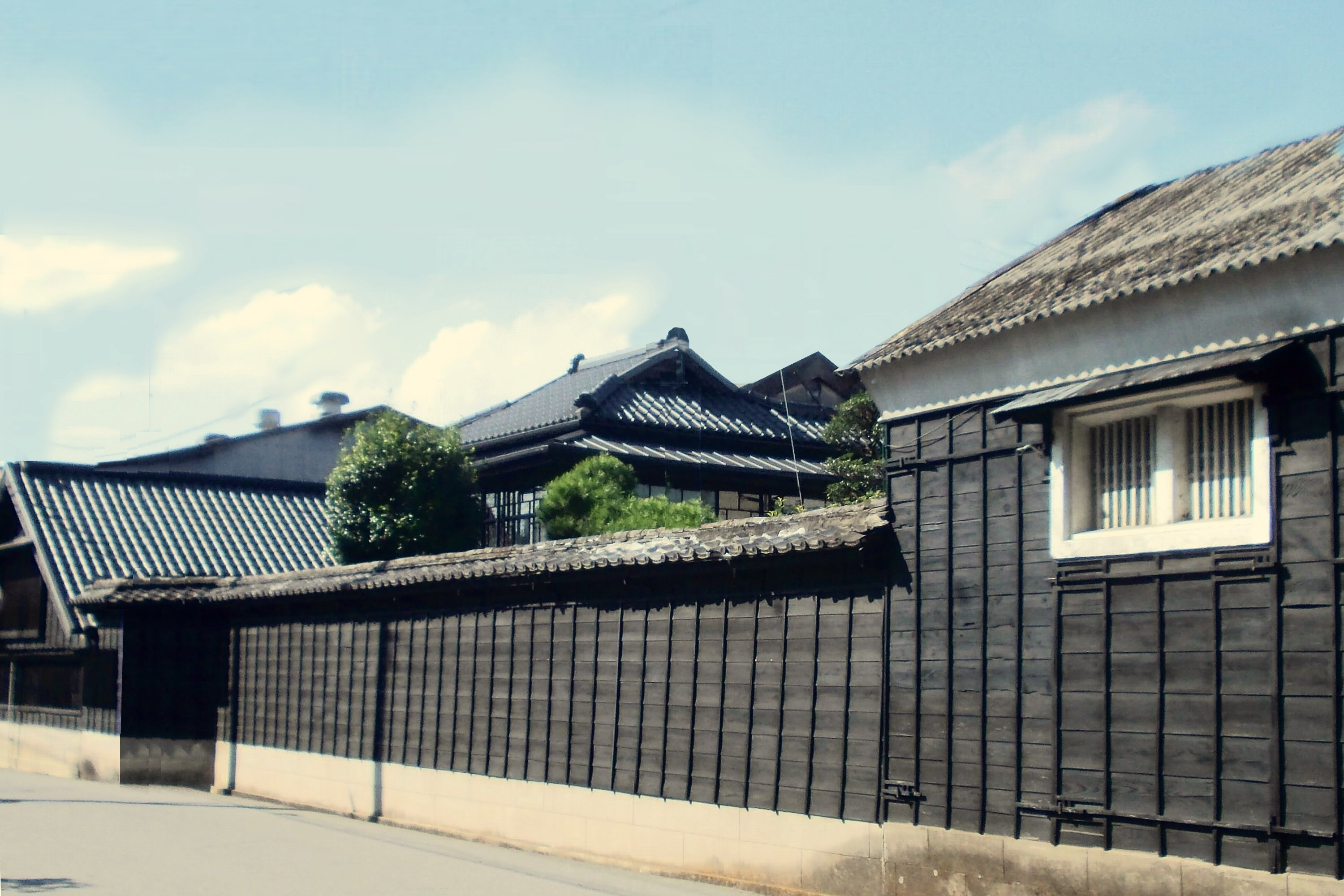 キノエネ醤油・山下邸 （近代化産業遺産）